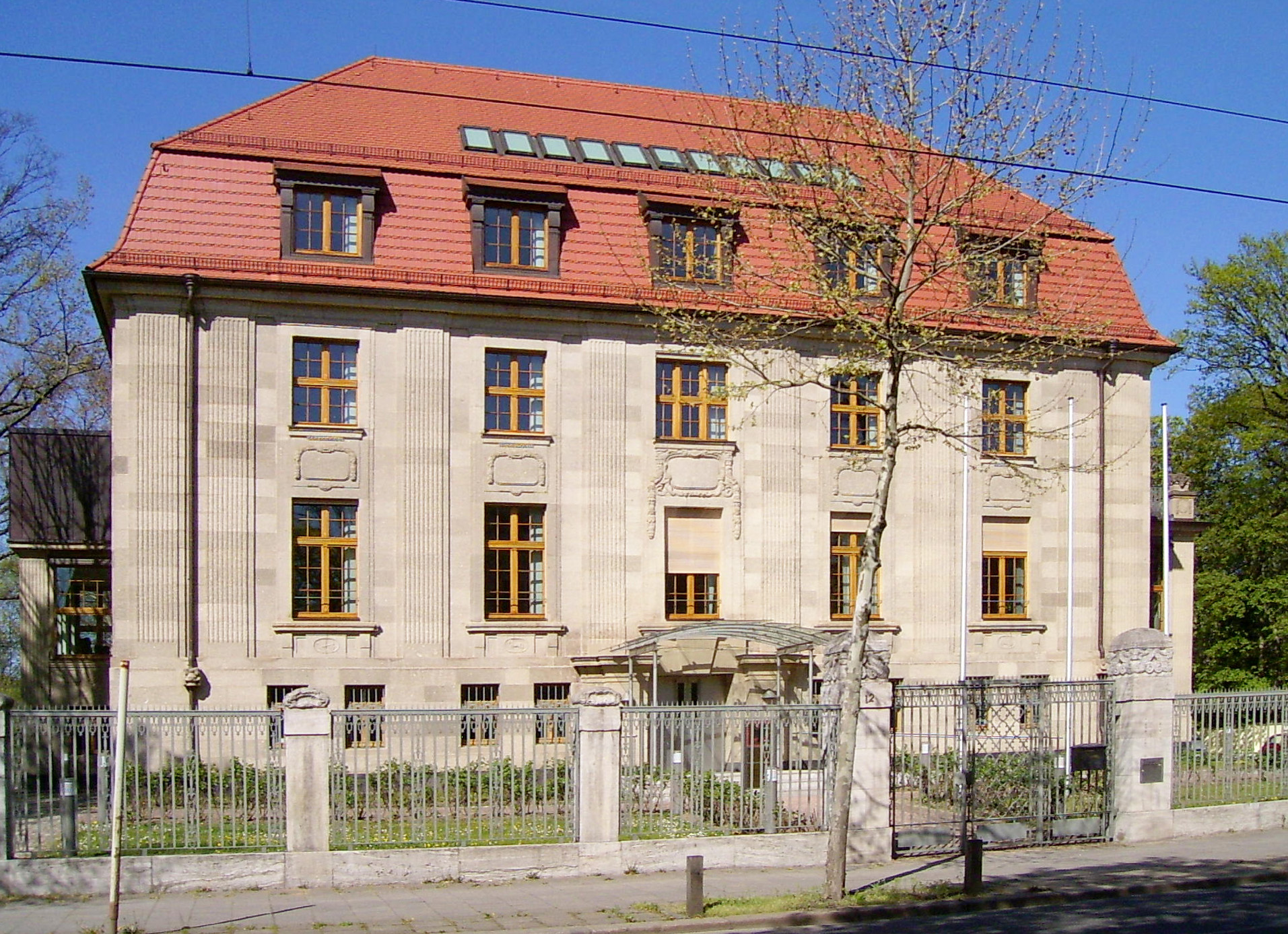 Leipzig-Plagwitz, Karl-Heine-Straße 12: um 1909 erbaut als Villa des Fabrikanten Friedrich Sack, heute Sitz des 5. Strafsenats des Bundesgerichtshofs.